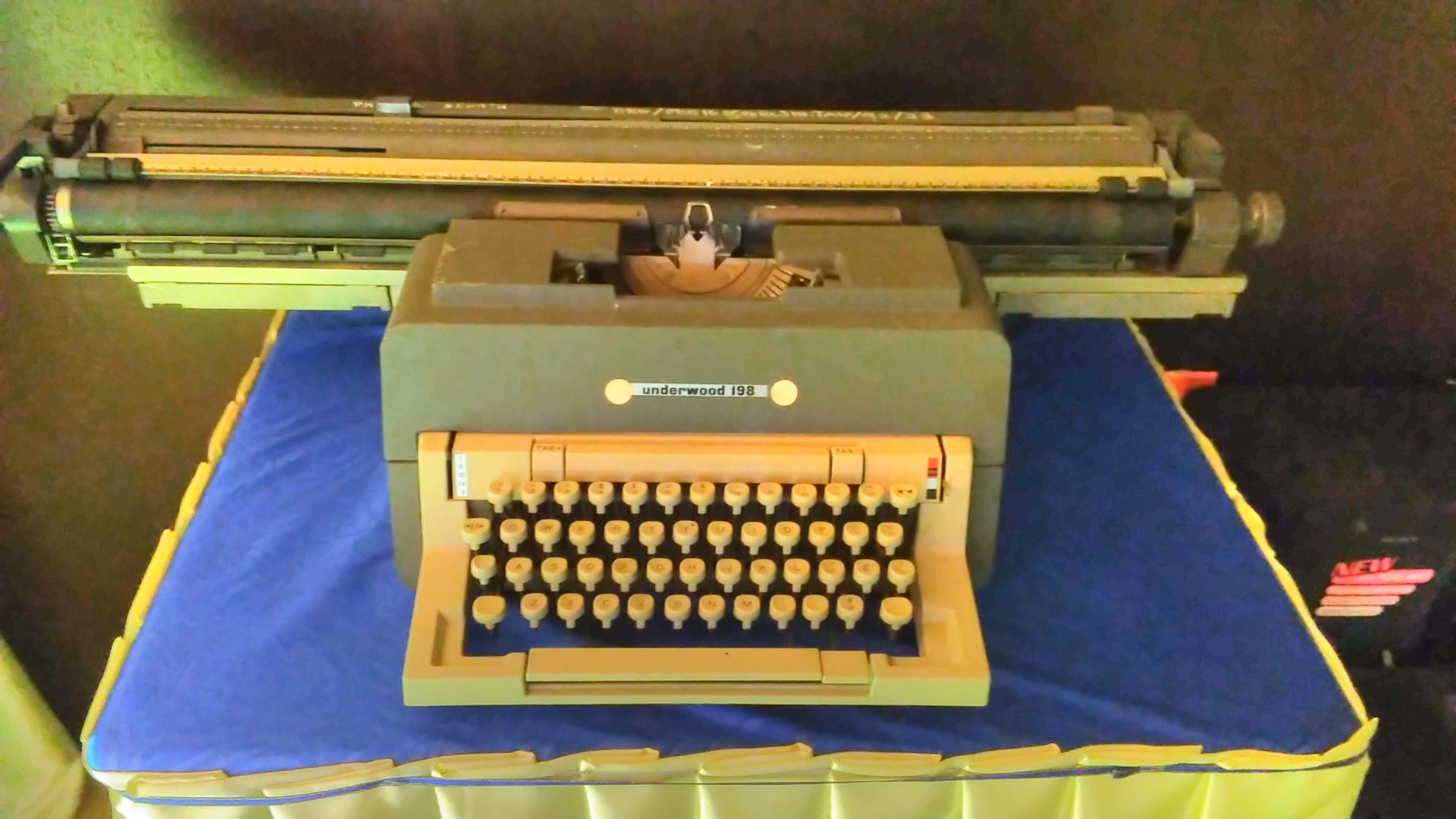 Mesin Taip Pejabat